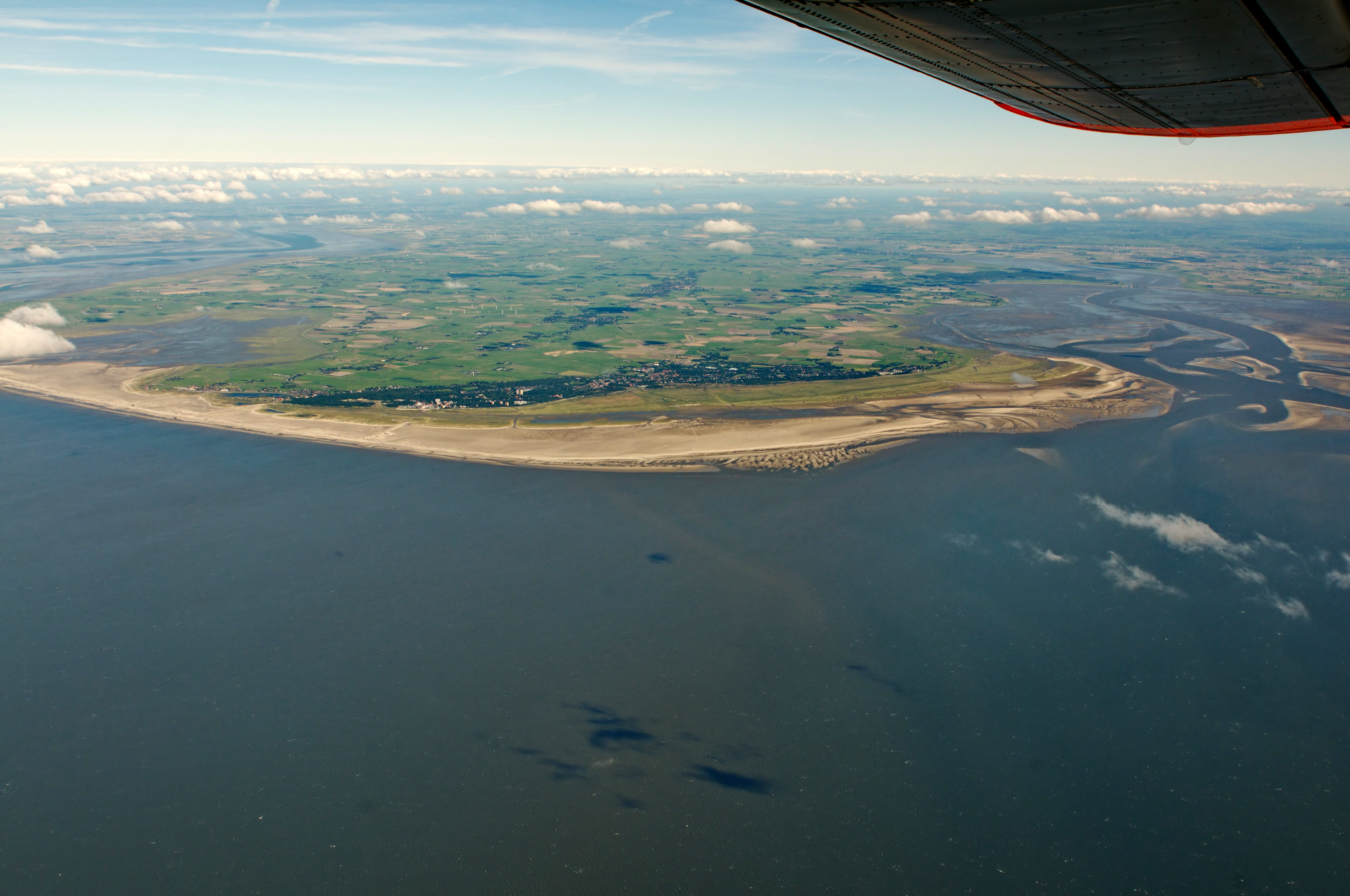 Fotoflug über das nordfriesische Wattenmeer – St. Peter-Ording (von SW)